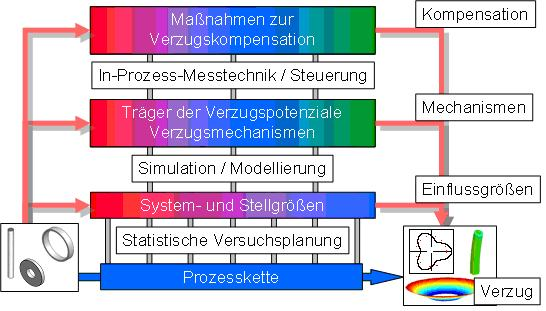 Vorgehen im Distortion Engineering